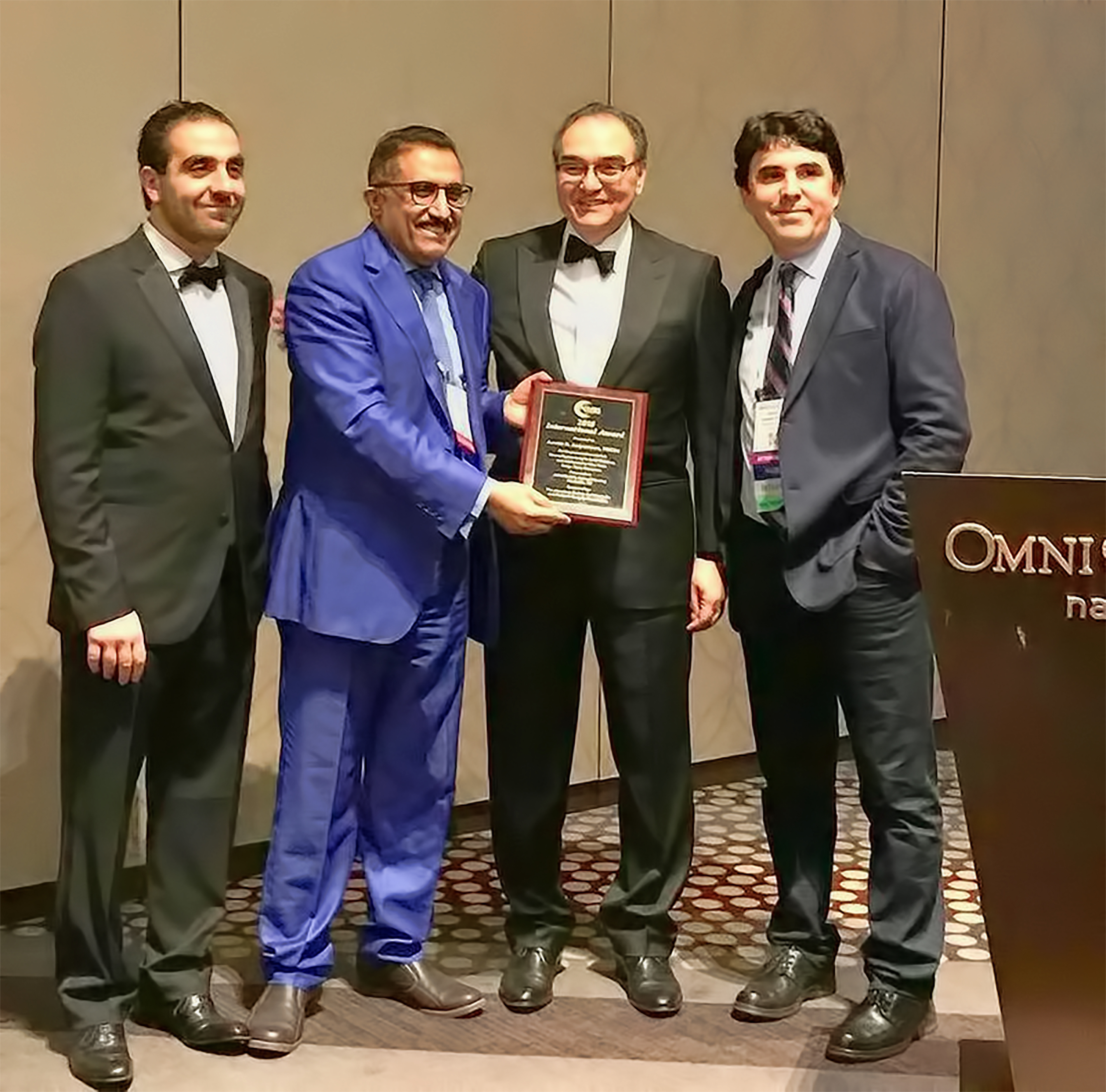 البروفيسور عائض القحطاني أول طبيب سعودي ينال الجائزة العالمية الأمريكية في جراحة سمنة الأطفال